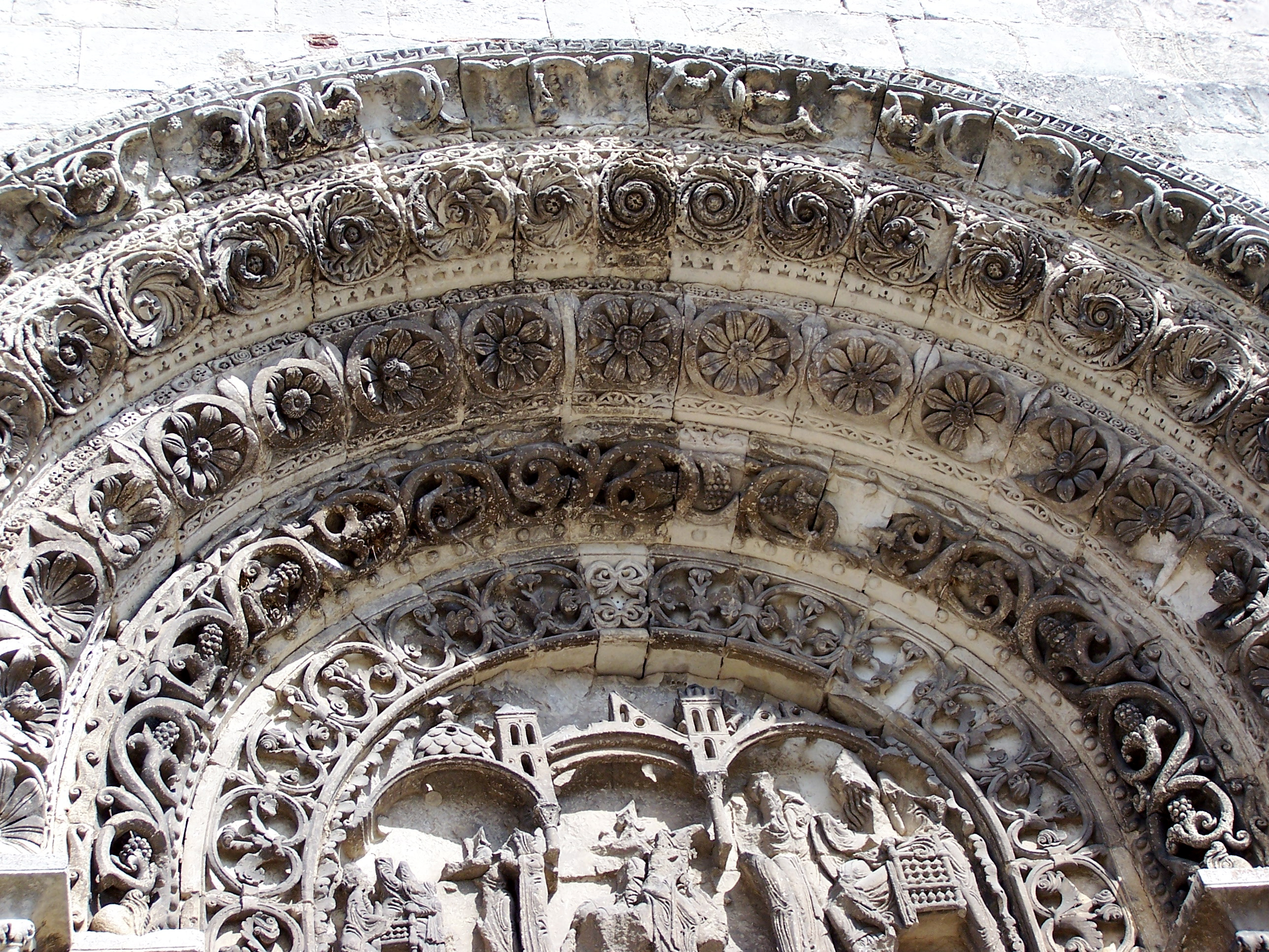 Avallon dans l'Yonne (détail du petit portail de l'église St-Lazare) Août 2006